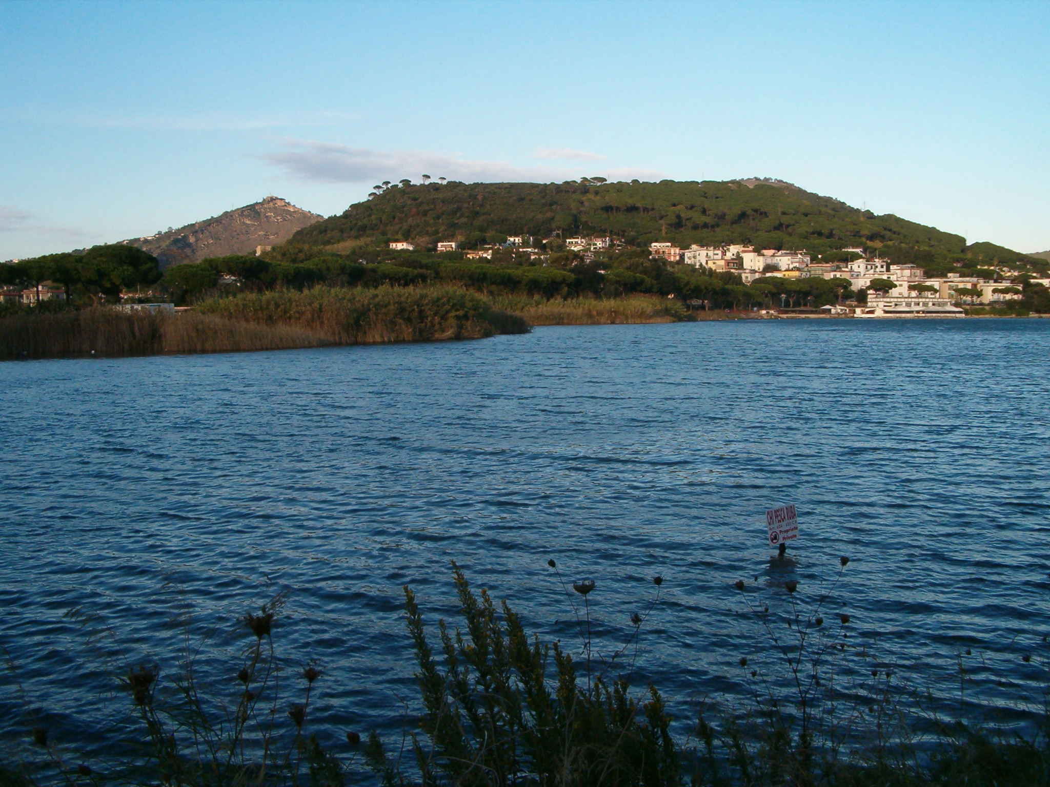 Campi Flegrei, vulcano Monte Nuovo. Veduta dal Lago Lucrino.